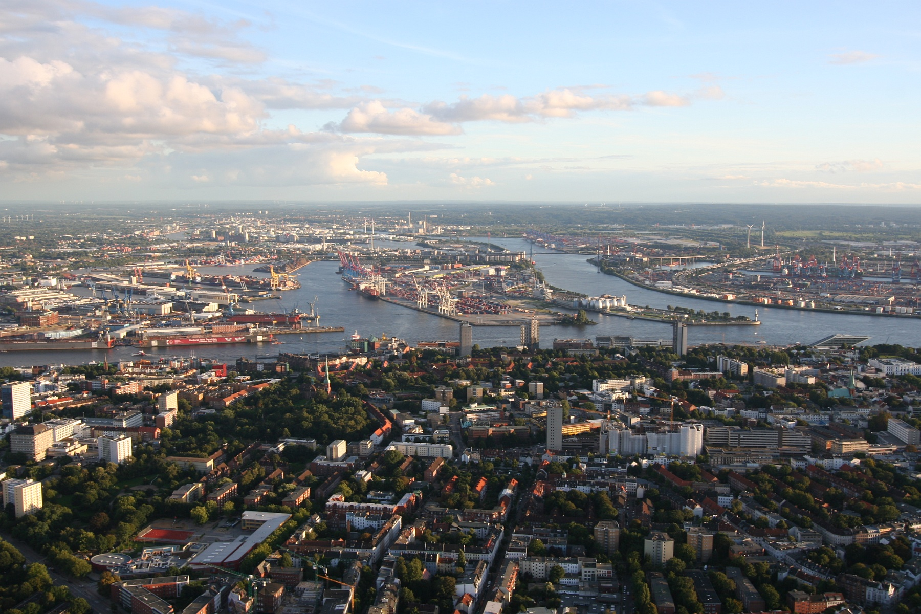 Blick über St. Pauli auf die Elbe und den Köhlbrand-Kanal